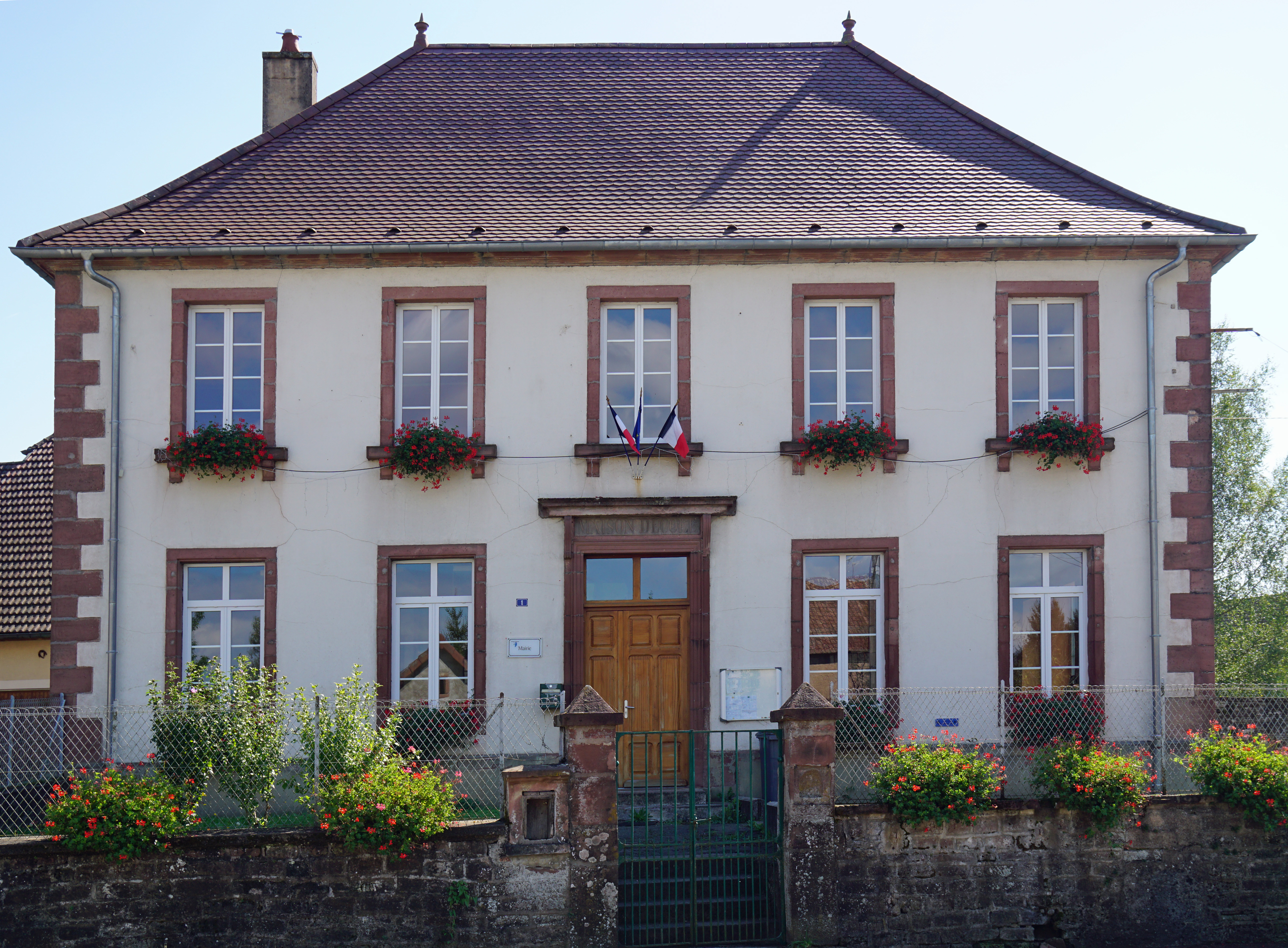 La mairie de Senargent-Mignafans, situé au centre de Senargent.